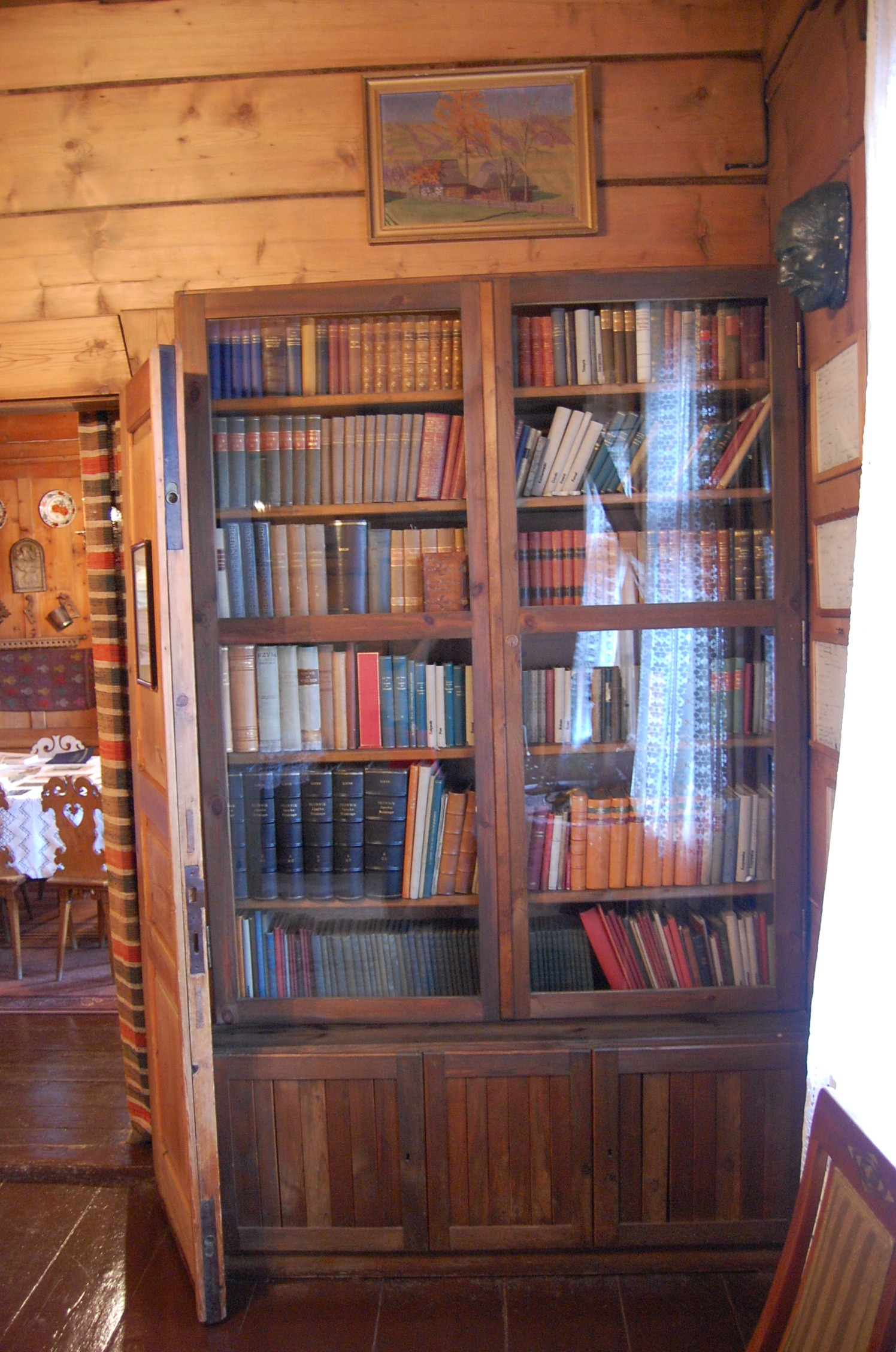 Pozostałość księgozbioru Kasprowicza na Harendzie